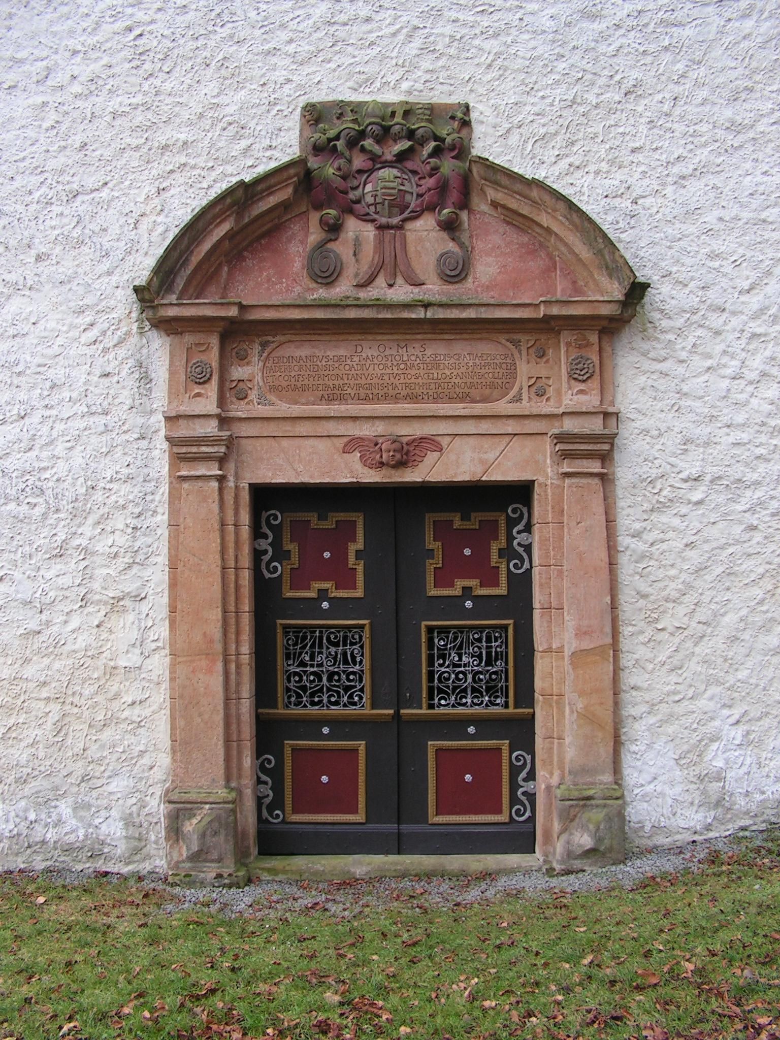 Pfarrei St. Kilian Lichtenau i. W.: Filialkapelle St. Anna in Amerungen, Portal von 1669